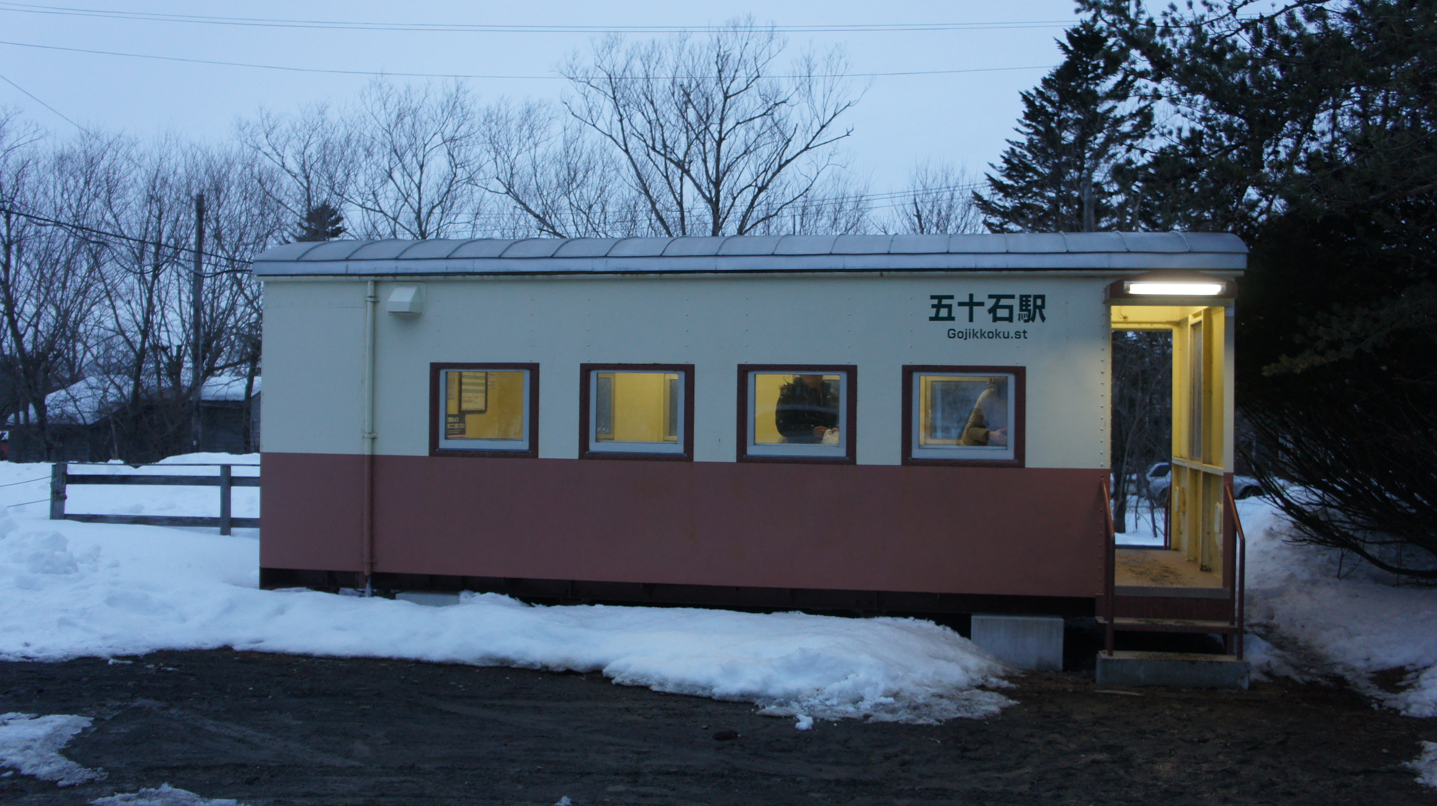 JR釧網本線・五十石駅の駅舎 Sony NEX-3